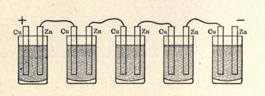 Pila di Volta a corona di tazze